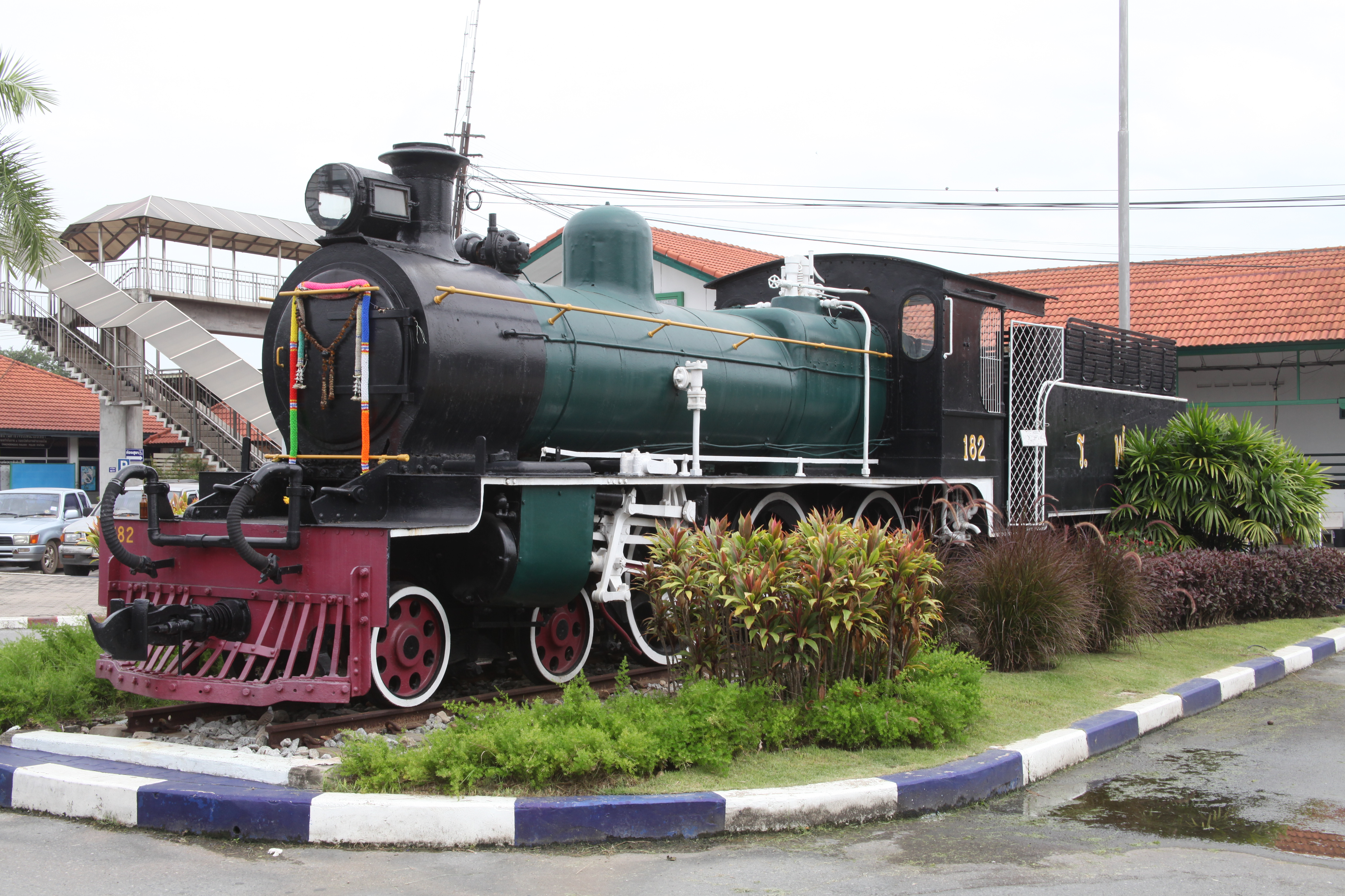 タイ国鉄蒸気機関車182号機